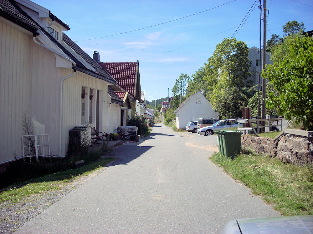 Bilde av Nils Hjelmtveits vei, Eydehavn , Arendal, Norge, tatt mot vest